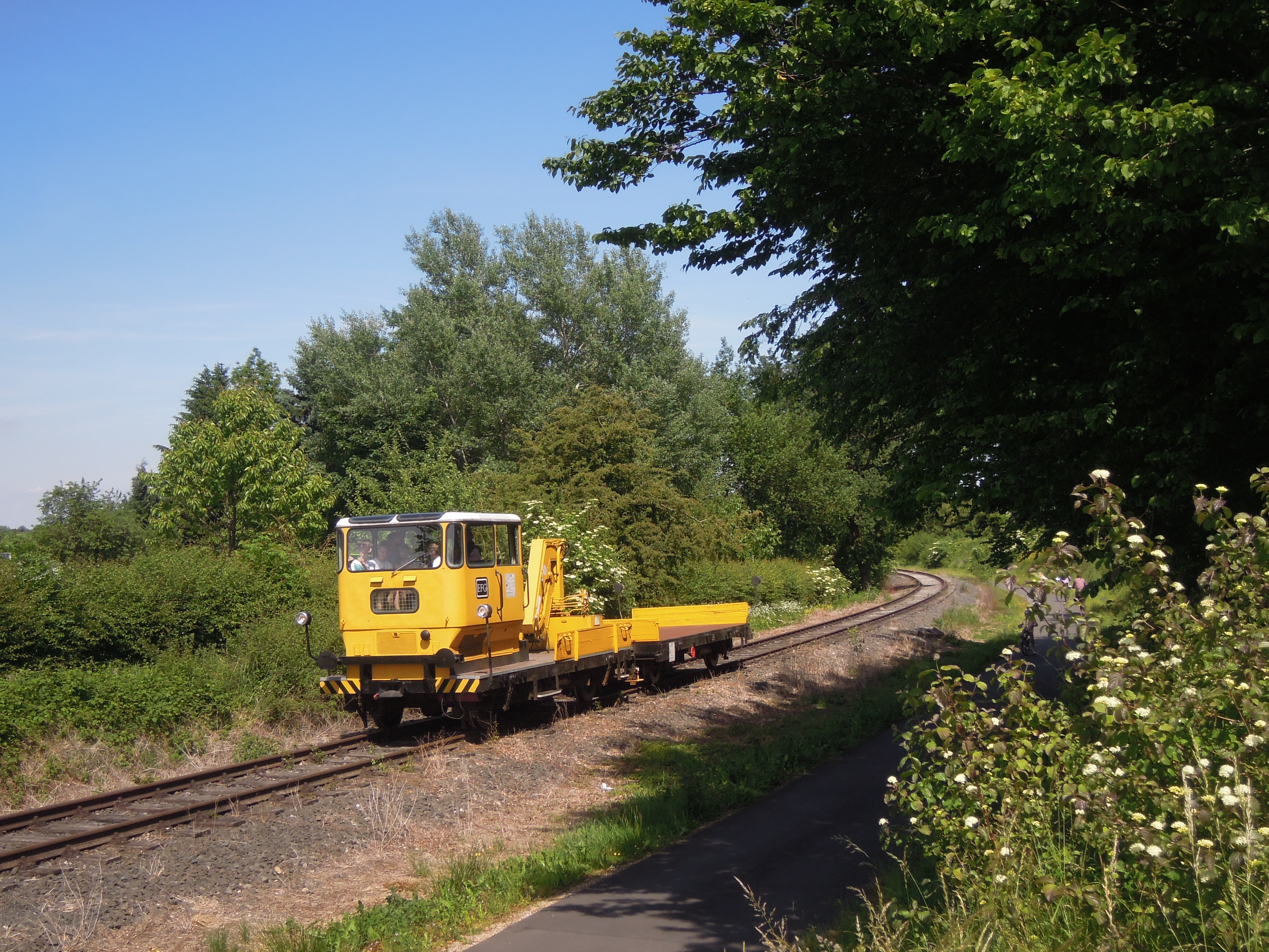 Sonderfahrt der Eisenbahnfreunde Grenzland mit einem Klv 53 im Juni 2015.